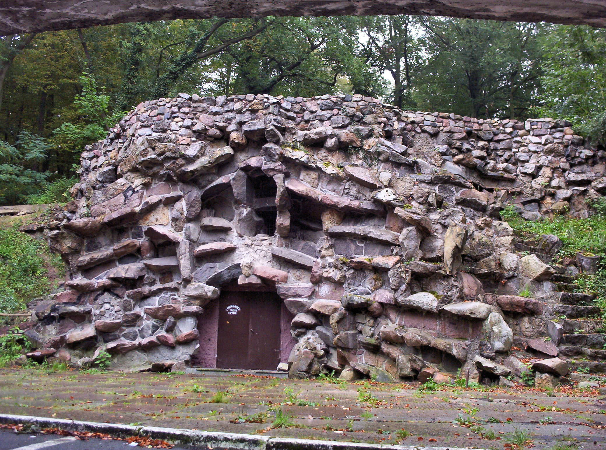 Grota za Łukami przy ul. Grabowej w Szczecinie Zdrojach